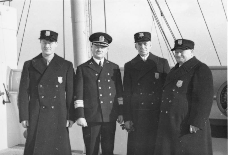 Factual corrections and alternative descriptions are encouraged separately from the original description. Additionally errors can be reported at this page to inform the Bundesarchiv. Original historic description: Bremen, Avery Brundage eingetroffen Scherl: Der Präsident des amerikanischen Olympia-Komitees in Deutschland eingetroffen. Mit dem Schnelldampfer "Bremen" des Norddeutschen Lloyd sind soeben der Präsident des amerikanischen Olympia-Komitees, Avery Brundage, sowie der Schatzmeister des Komitees Gustav Kirby und das Vorstandsmitglied Dietrich Wortmann zu den olympischen Spielen in Deutschland eingetroffen. Die Gäste wurden vom Senat der Hansestadt Bremen feierlich empfangen und mit einem Ehrentrunk begrüßt. V.l.n.r.: Avery Brundage, Kommodore Ziegenbein, der Führer der "Bremen", Gustav Kirby, und Dietrich Wortmann. 1416-36 [Vorbereitung der Olympischen Winterspiele in Garmisch-Partenkirchen] Abgebildete Personen: * Brundage, Avery: Präsident des Internationalen Olympischen Komitees (IOC), USA (GND 118516078) * Kirby, Gustav: Schatzmeister des Olympischen Komitees, USA * Ziegenbein, Leopold: Kapitän des Schnelldampfers Bremen, Kommodore, Deutschland :w:de:Leopold Ziegenbein (GND 124981992) Avery Brundage (left) with Leopold Ziegenbein, Captain of the S.S. Bremen (second to left), US Olympic official Gustavus Kirby, and Dietrich Wortmann. Aboard the Bremen, January 1936; the ship carried the US Winter Olympic team across the Atlantic; the Games were held in Garmisch-Partenkirshen.